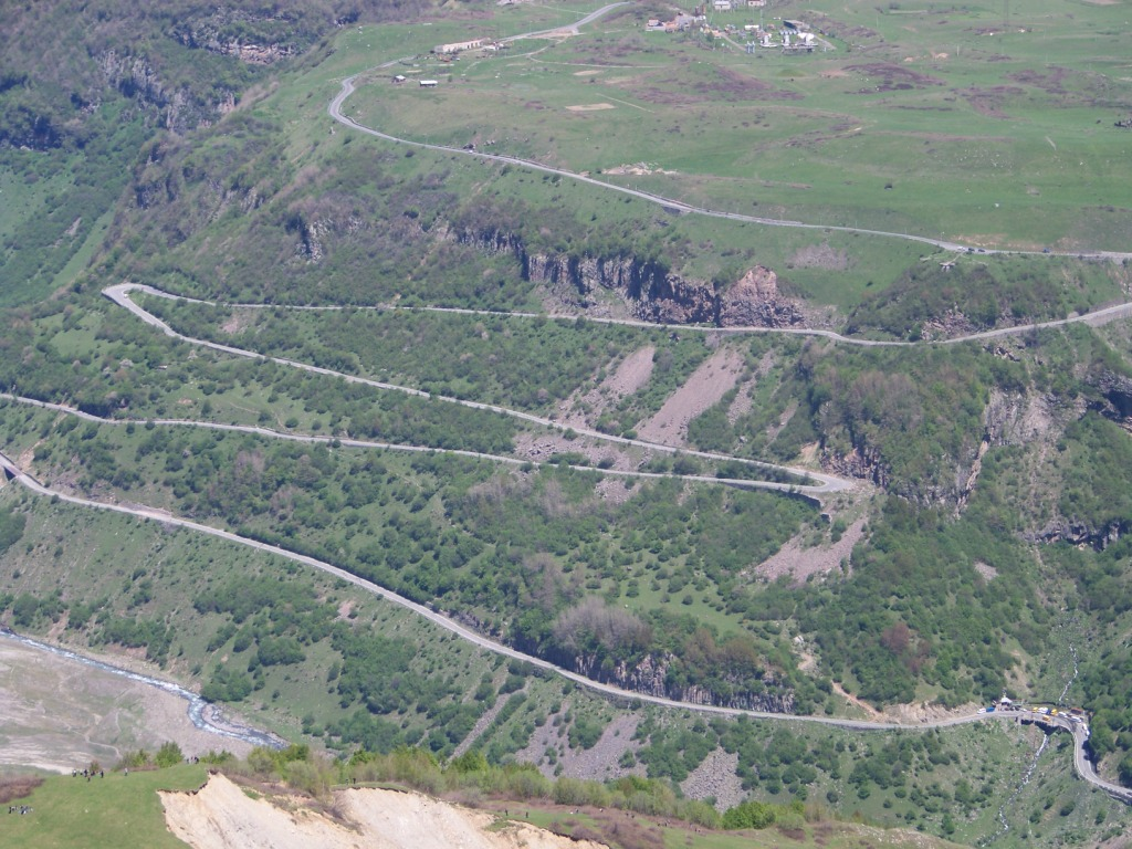 საქართველოს საავტომობილო გზის (ს 3)-ის გუდაურის მონაკვეთი